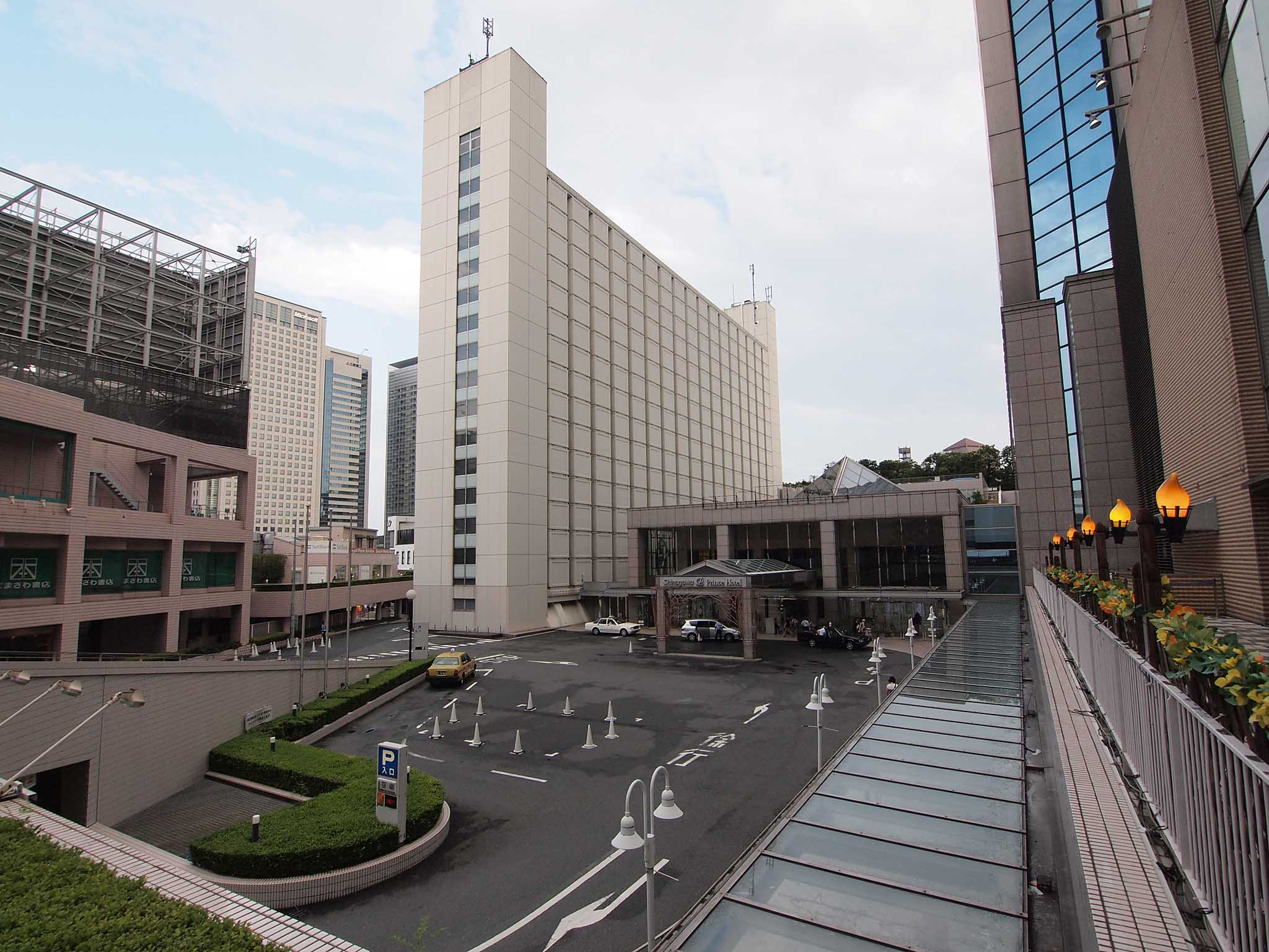 品川プリンスホテルの車寄せとイーストタワーをアネックスタワー2階から俯瞰。車両はイーストタワーとウィング高輪ウェストの間から出入りする。